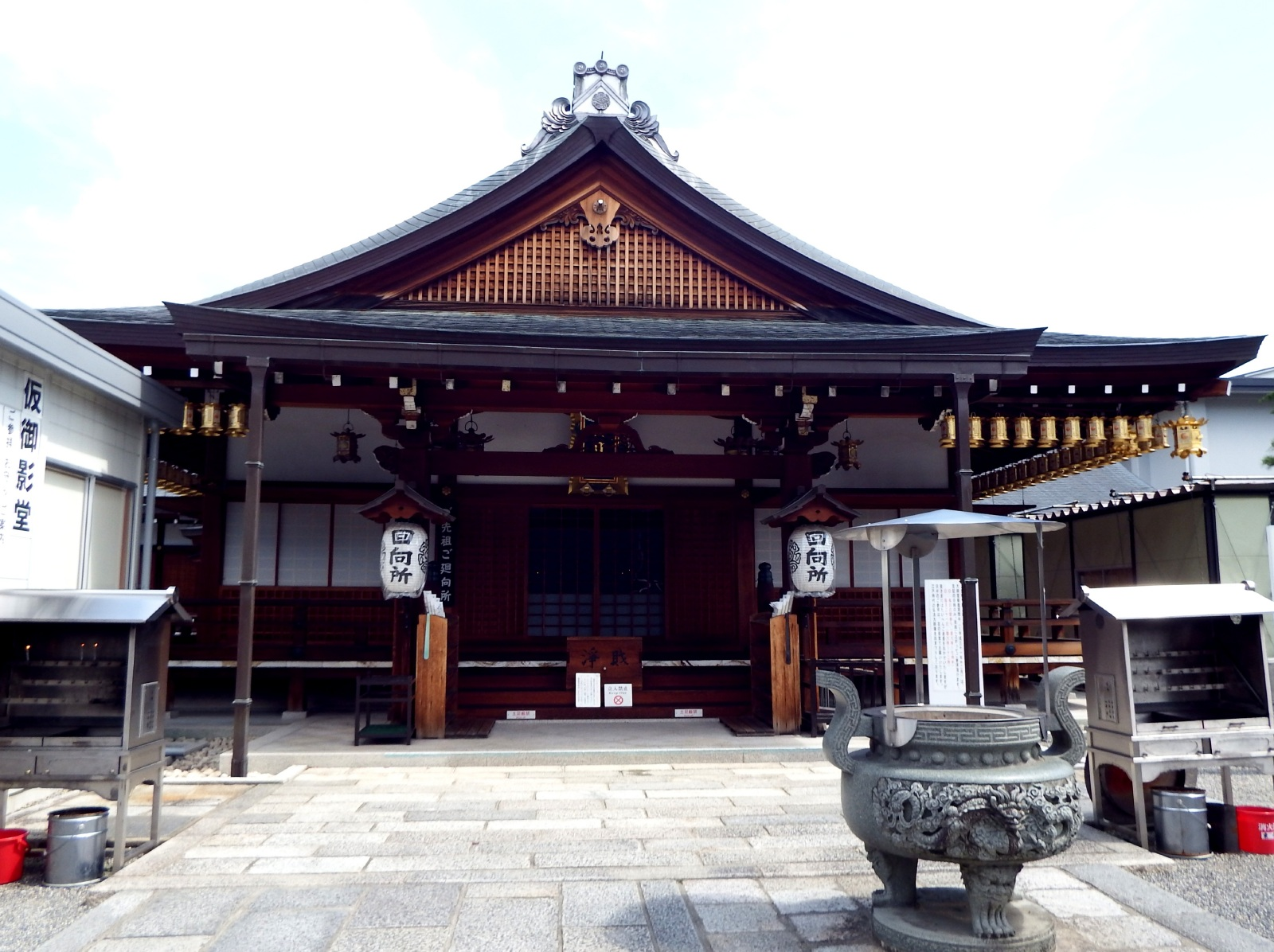 東寺の大日堂